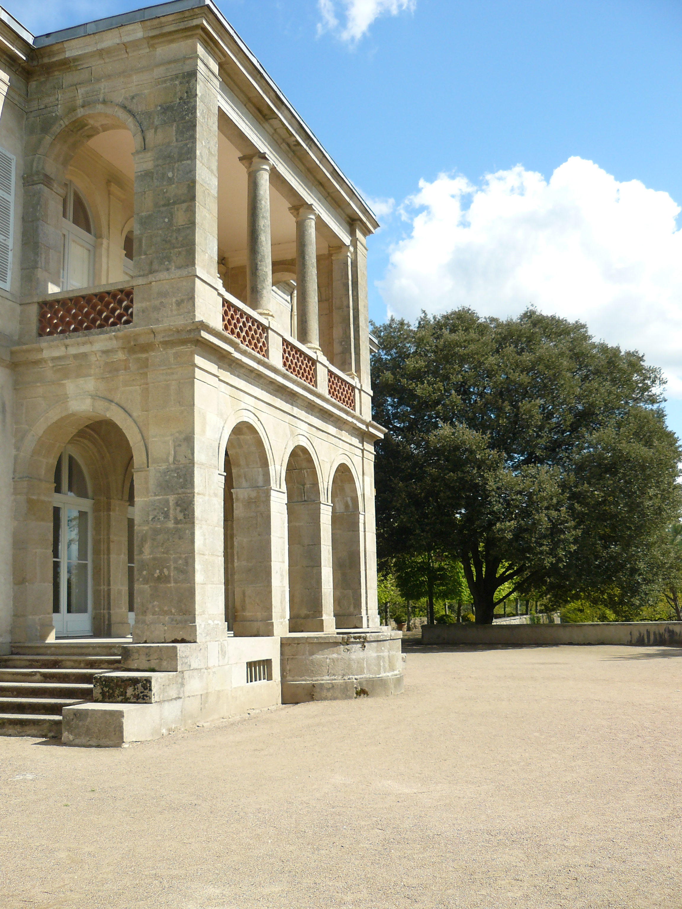 Villa Garenne Lemot, vue de la logia depuis la terrasse. Gétigné, Loire-Atlantique, France